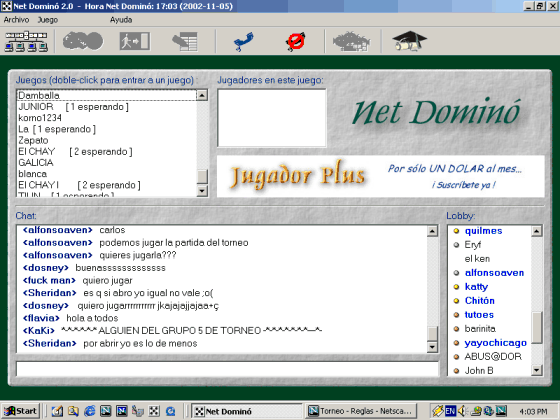 Lobby de Net Dominó